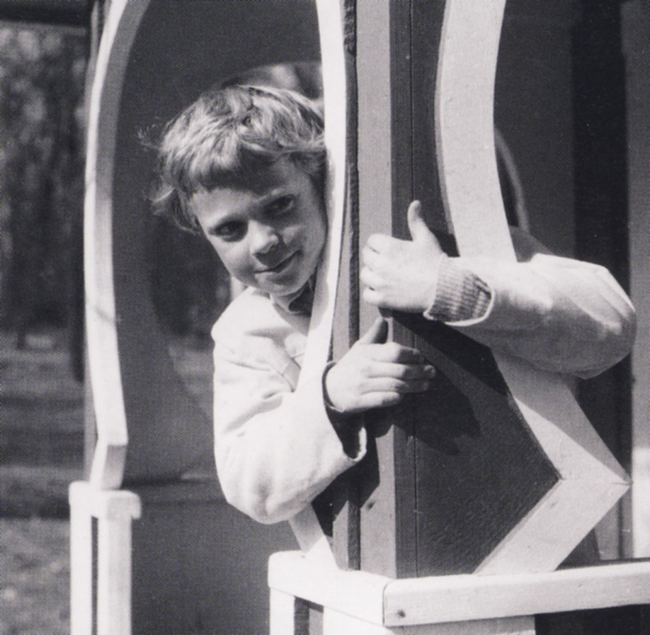 Prins Carl Gustaf på Haga (med lekstugan)